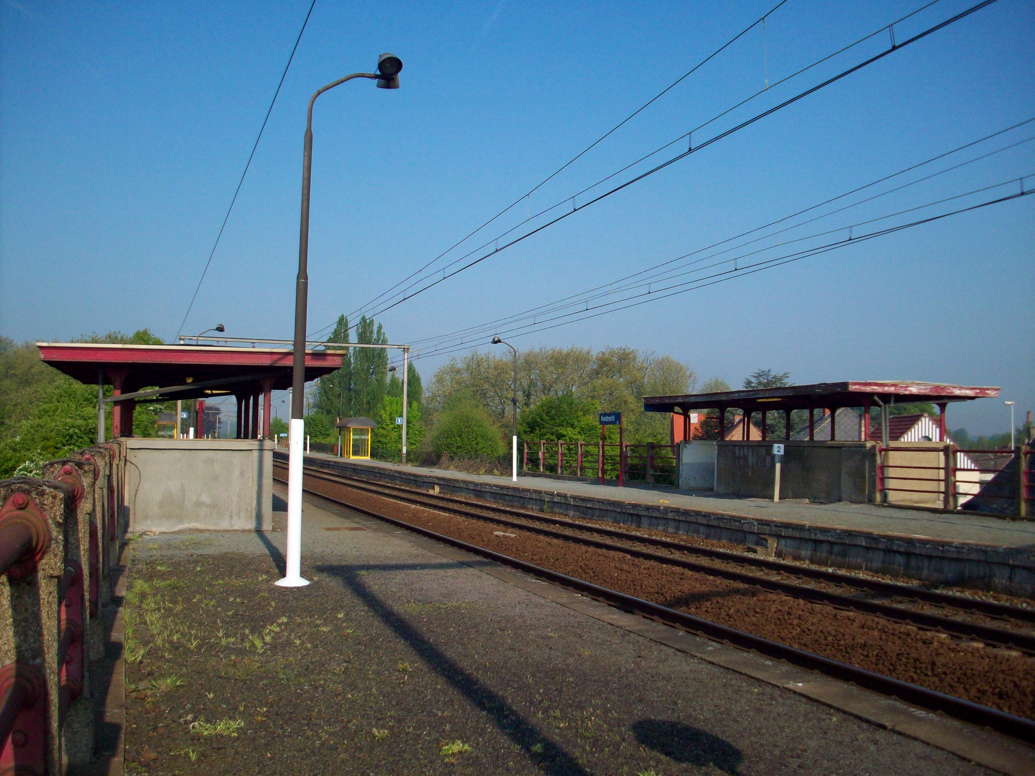 Station Kwatrecht